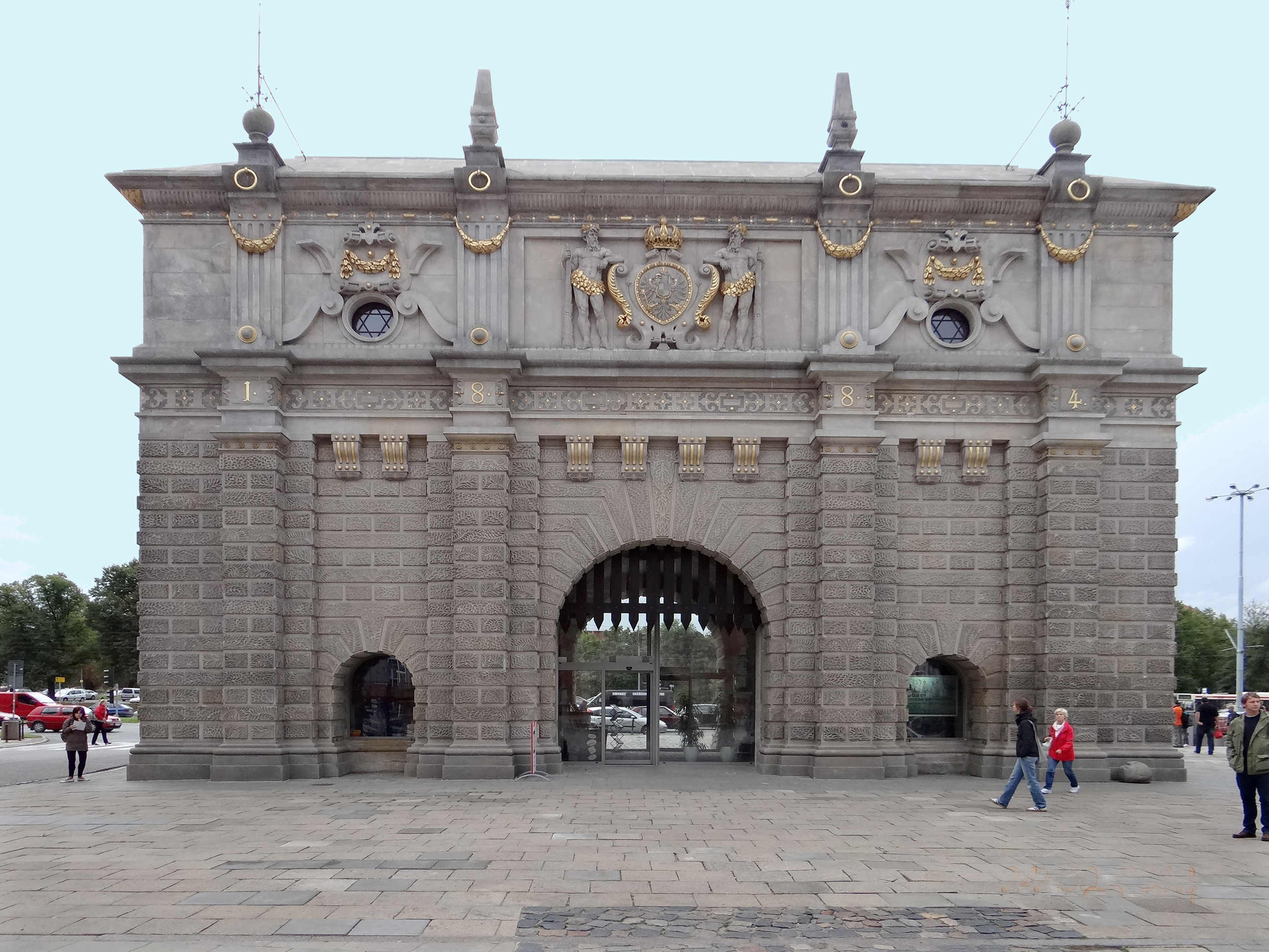 Gdańsk - Brama Wyżynna, XVII